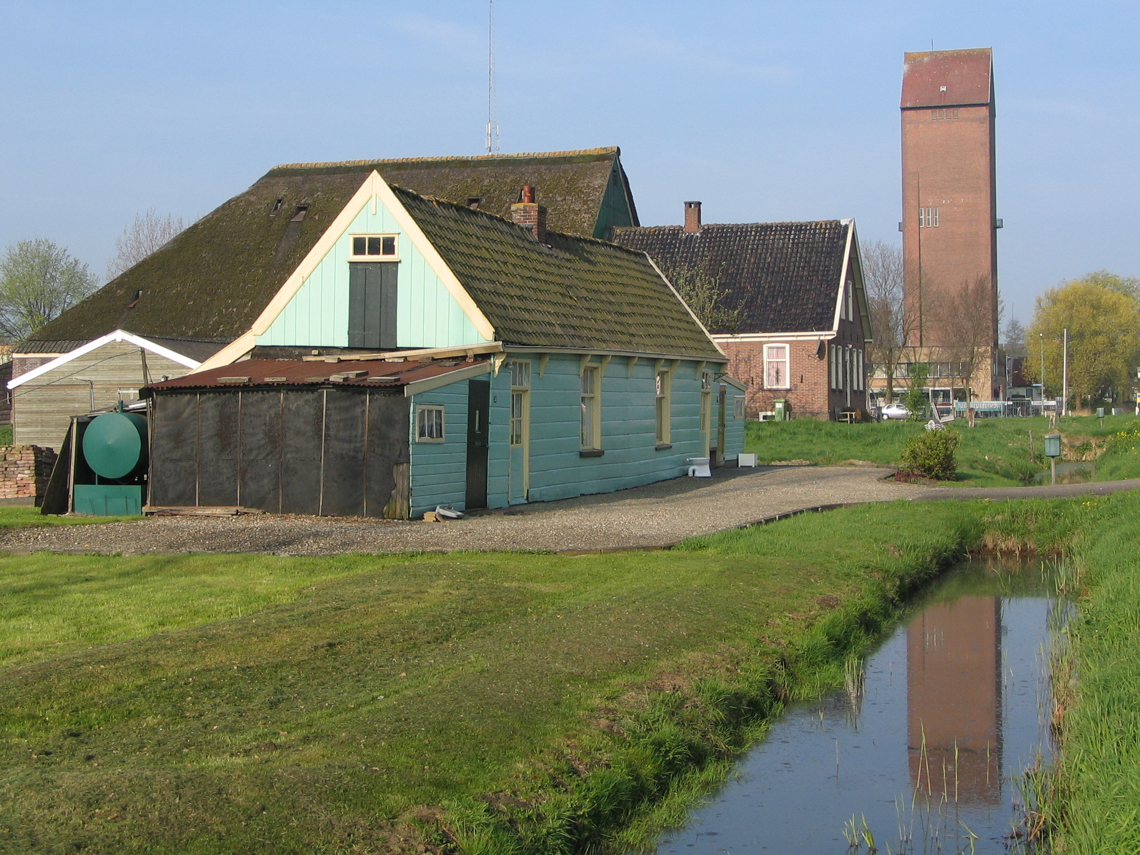 Zicht op drie rijksmonumenten: een monumenten ensemble 1. Vervenershuisjes monumentnr 514701 2. Kop-rompboerderij monumentnr. 514702 3. Watertoren monumentnr. 514700